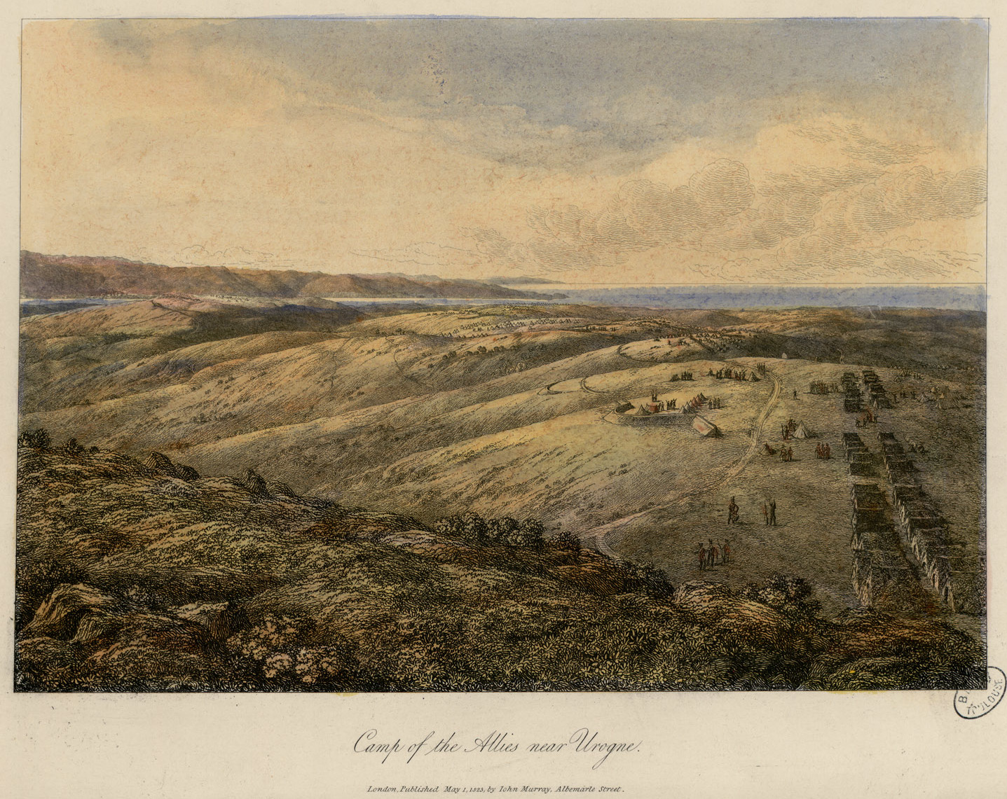 25 gravures sur cuivre aquarellées, 1 carte dessinée et gravée par B. R. Baker, imprimée par Rowney et Forster, lettre par J. Netherclift. - Toutes portent la mention : London, published May 1823, by John Murray, Albemarle Street. Il existe une traduction française, dactylographiée, réalisée par Renée Fourcade et déposée au Musée Basque de Bayonne. Il existe une traduction française, dactylographiée, réalisée par Renée Fourcade et déposée au Musée Basque de Bayonne. Double en couleurs du A-BATTY (1) Ancely, René (1876 - 1966). Possesseur